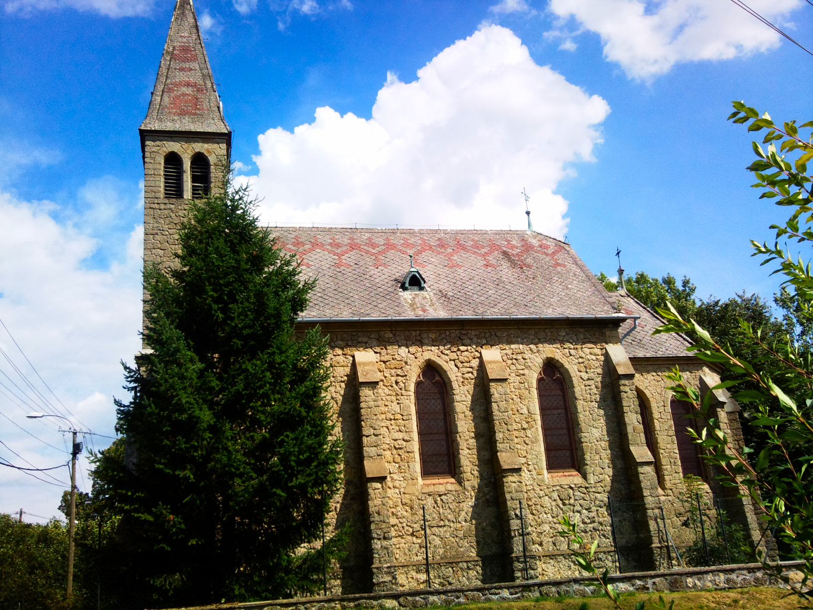 Farkasgyepű